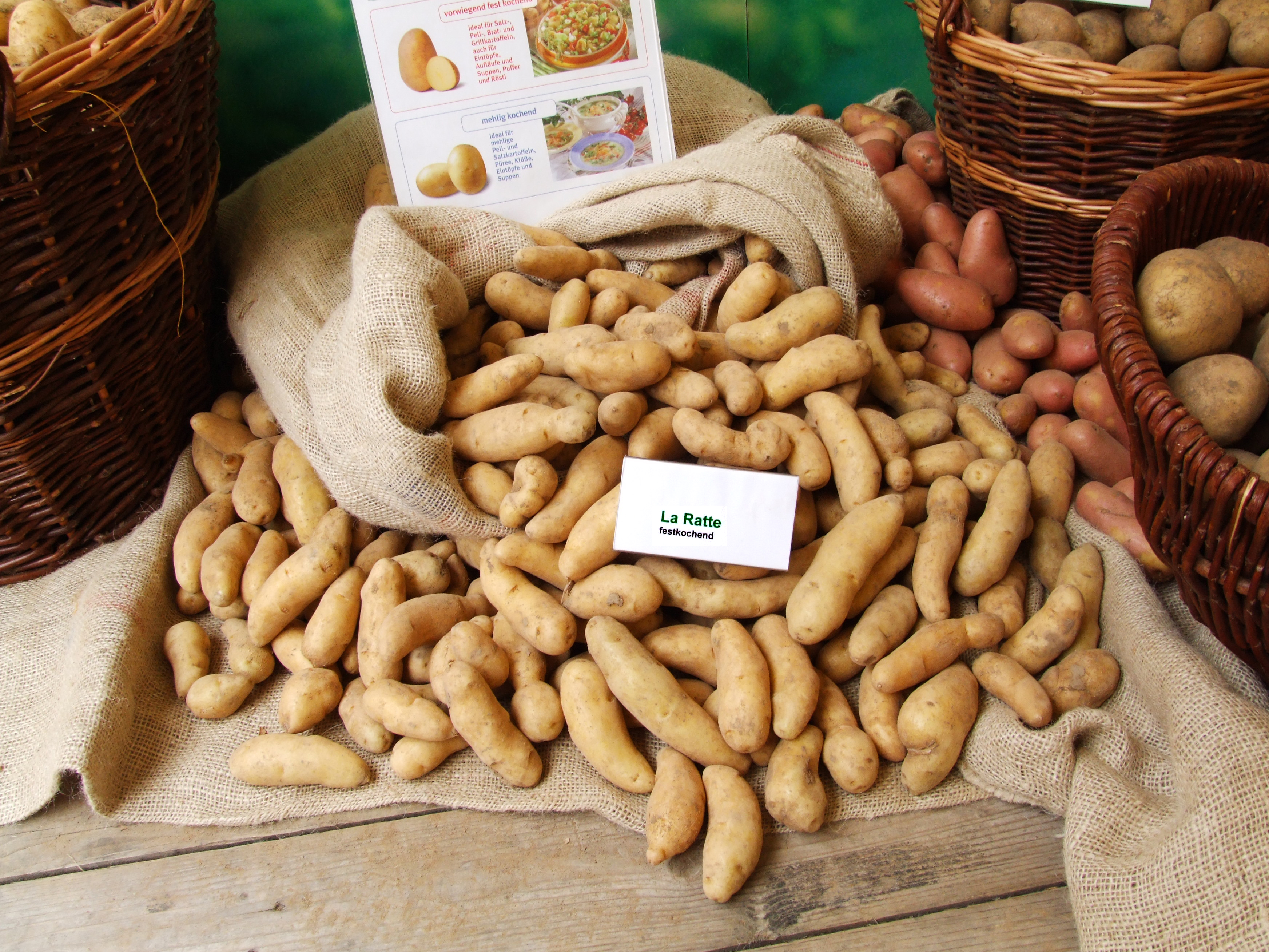 potato: La Ratte / historische französische Kartoffelsorte: La Ratte